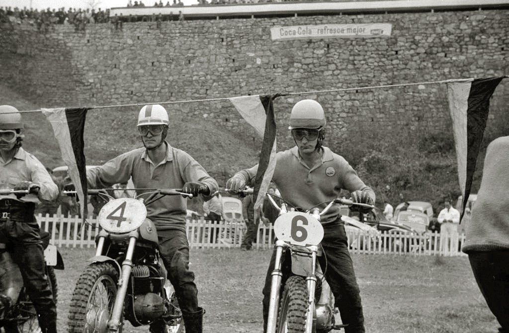 Título original: Competición de motocros en la zona de Aiete y Antiguo (16/30) Localización: San Sebastián (Guipúzcoa)